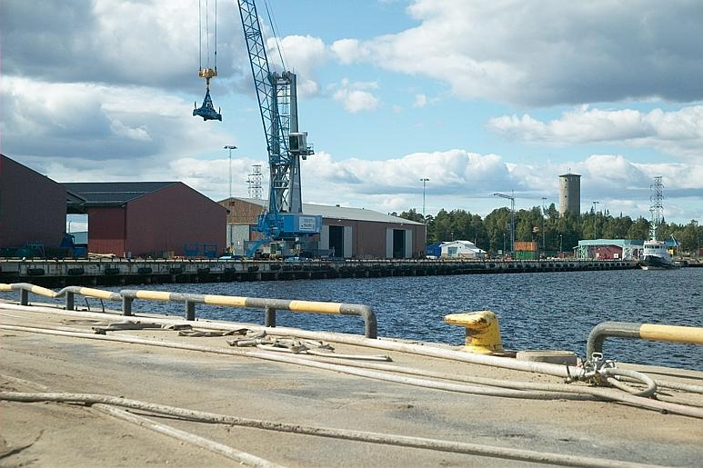 Hamnmiljöer; Miljöer